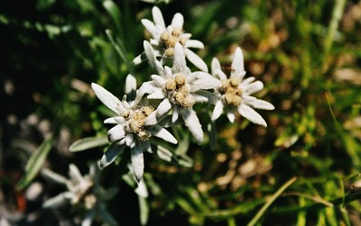 Edelweiß